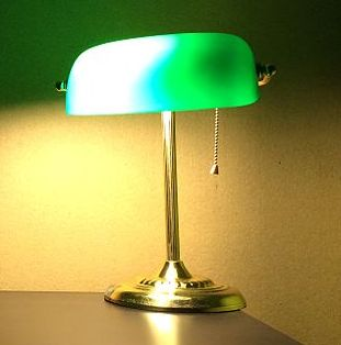 Green lamp on a desk.